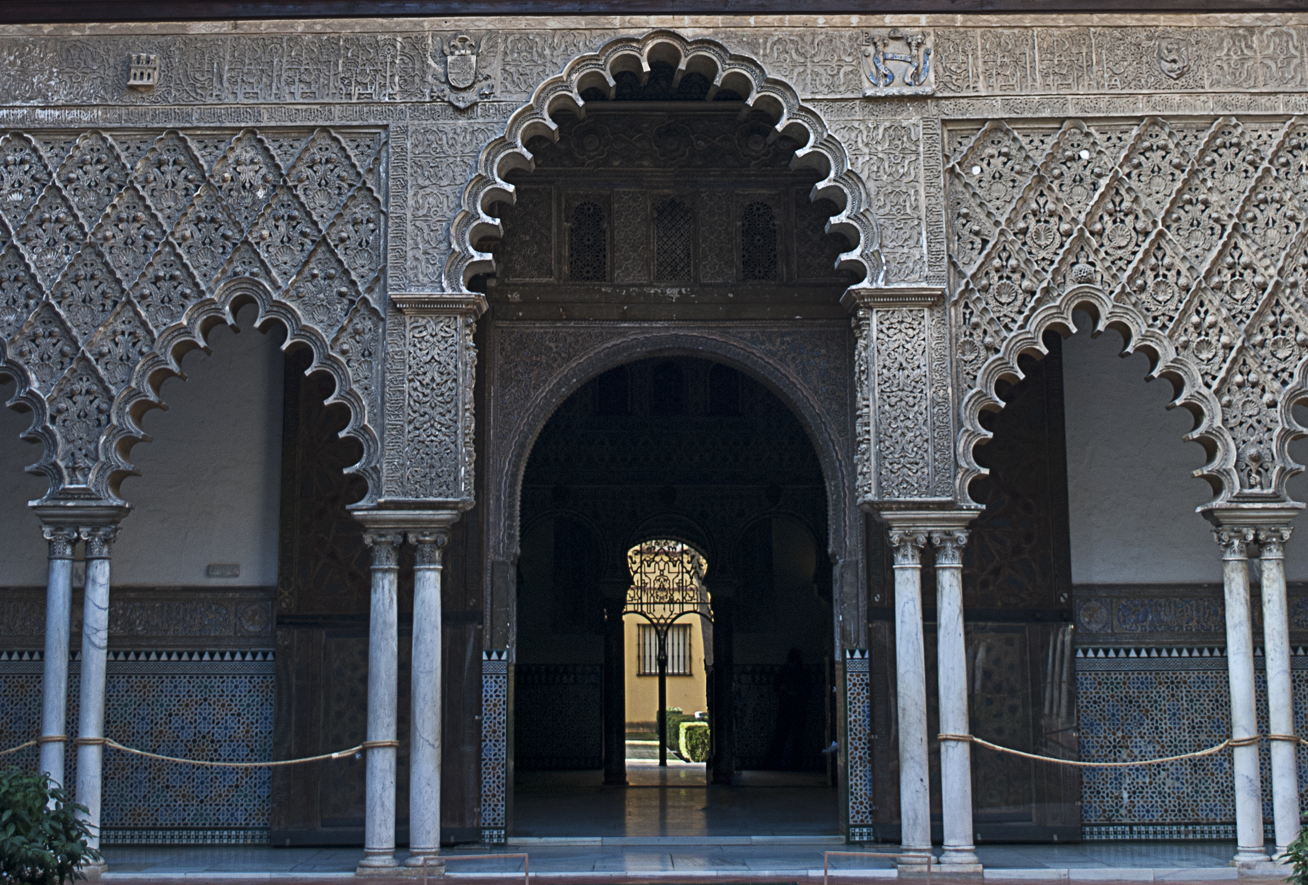 Patio de las doncellas en el Alcázar de Sevilla.